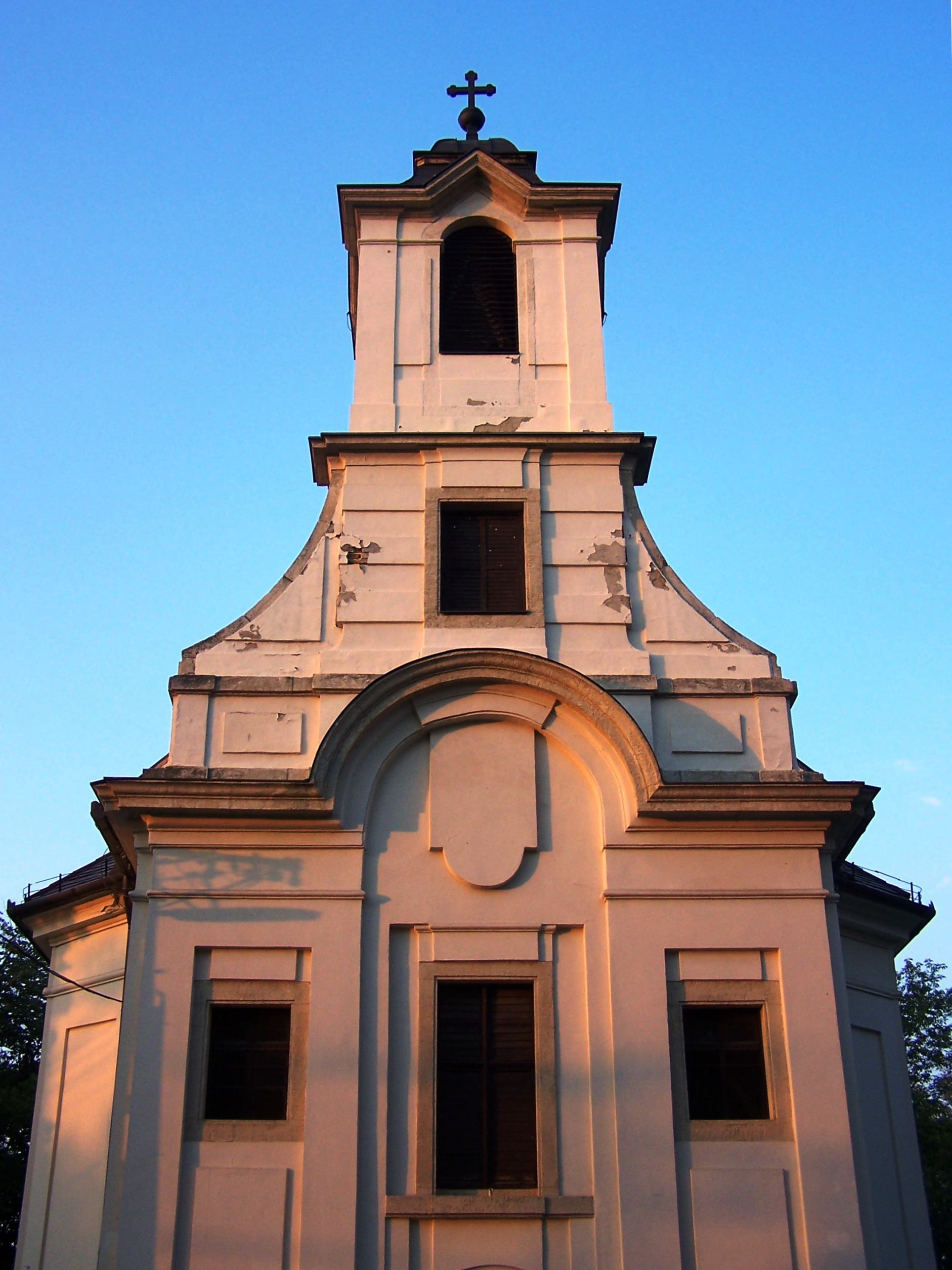 Nepomuki Szent János római katolikus templom (Gyömrő, Teleki u. (volt Bajcsy-Zsilinszky u.)) This is a photo of a monument in Hungary, Identifier: 7066